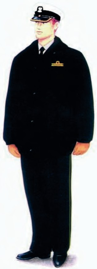 Ubiór wyjściowy funkcjonariuszy noszących umundurowanie MW z kurtką zimową nieprzemakalną i z czapką garnizonową.